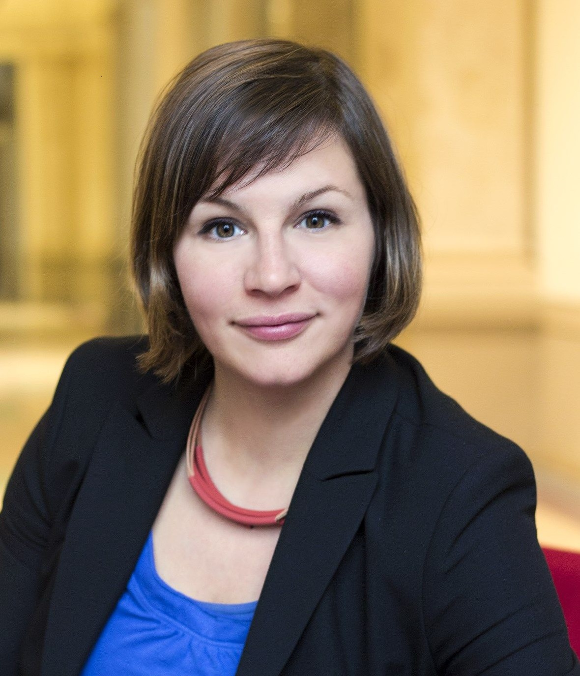 Fotografin: Maria Kapek